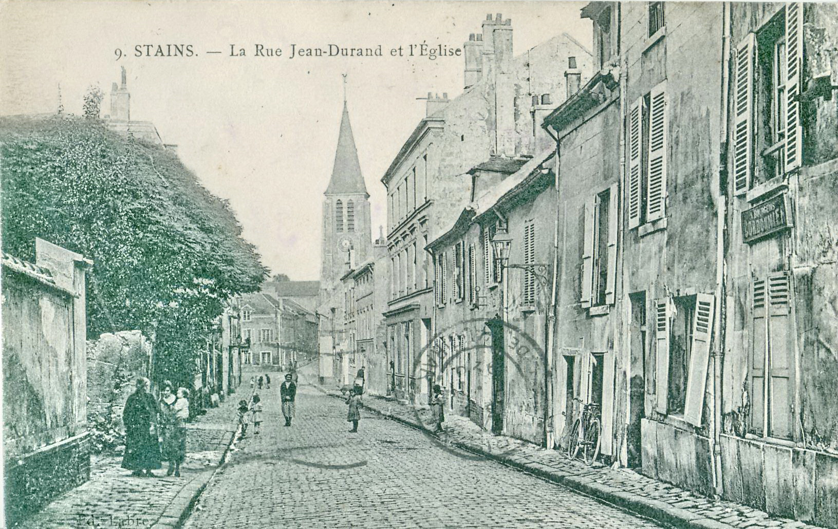 carte postale ancienne éditée par Labre, N°9Stains - La rue Jean Durand et l'Eglise